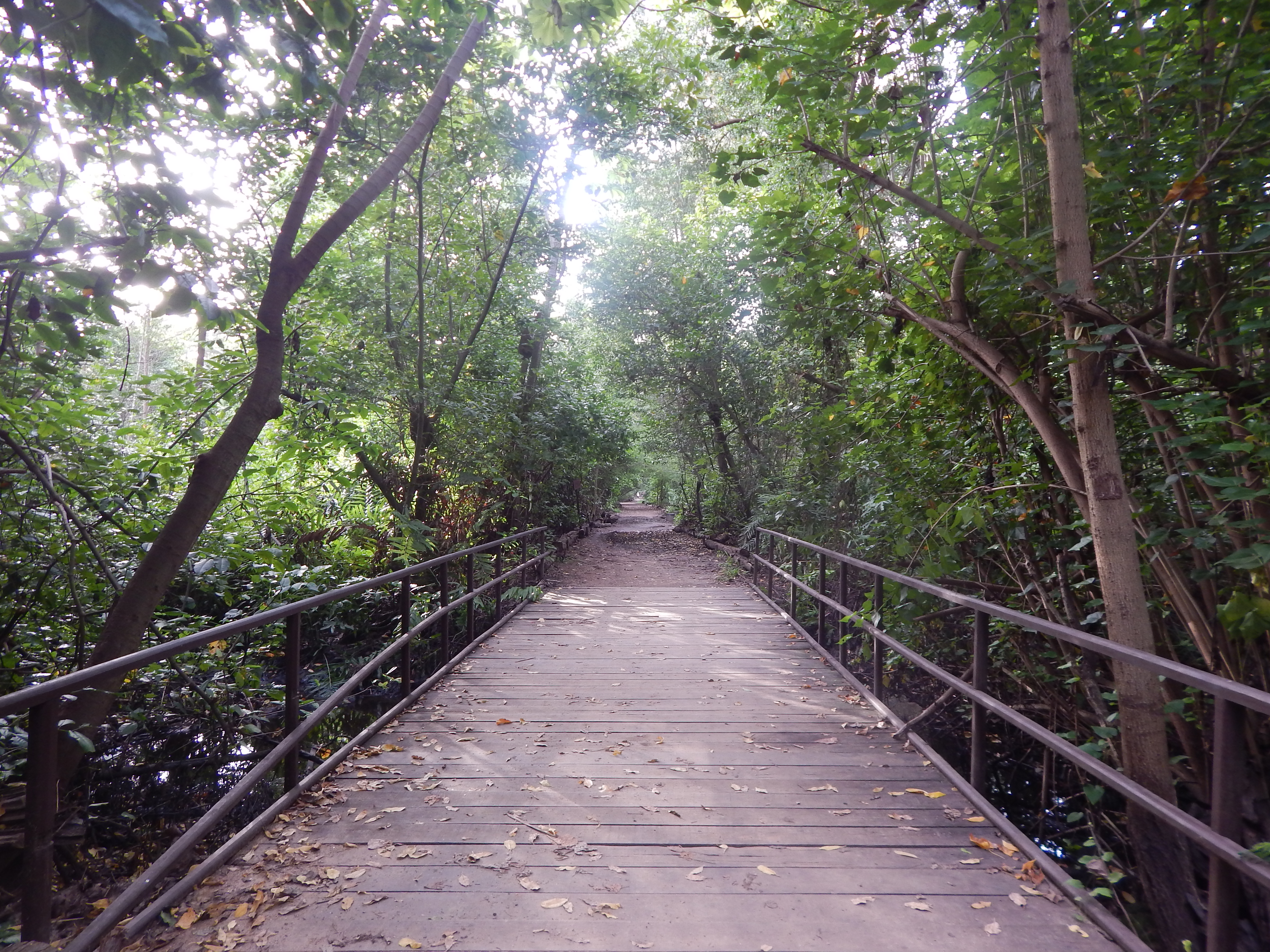 Ponte no Parque do Cocó